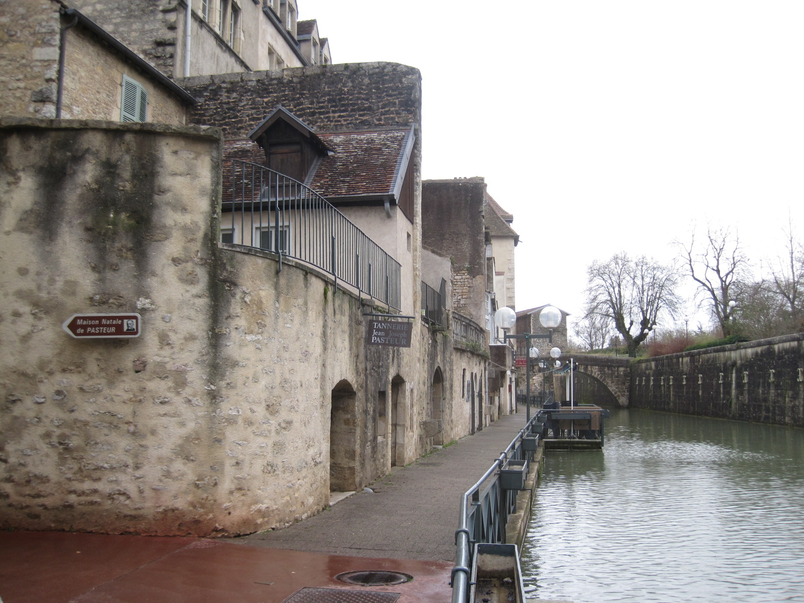 House of Pasteur in Dole - Ancienne tannerie de Jean-Joseph Pasteur coté canal